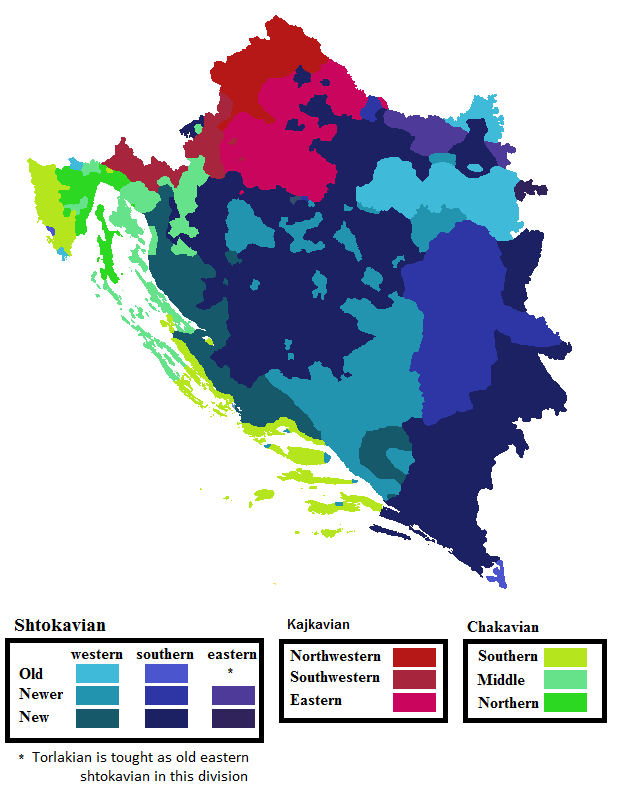 Bošnjački pogled na dijalekte u RH, BiH i Boki